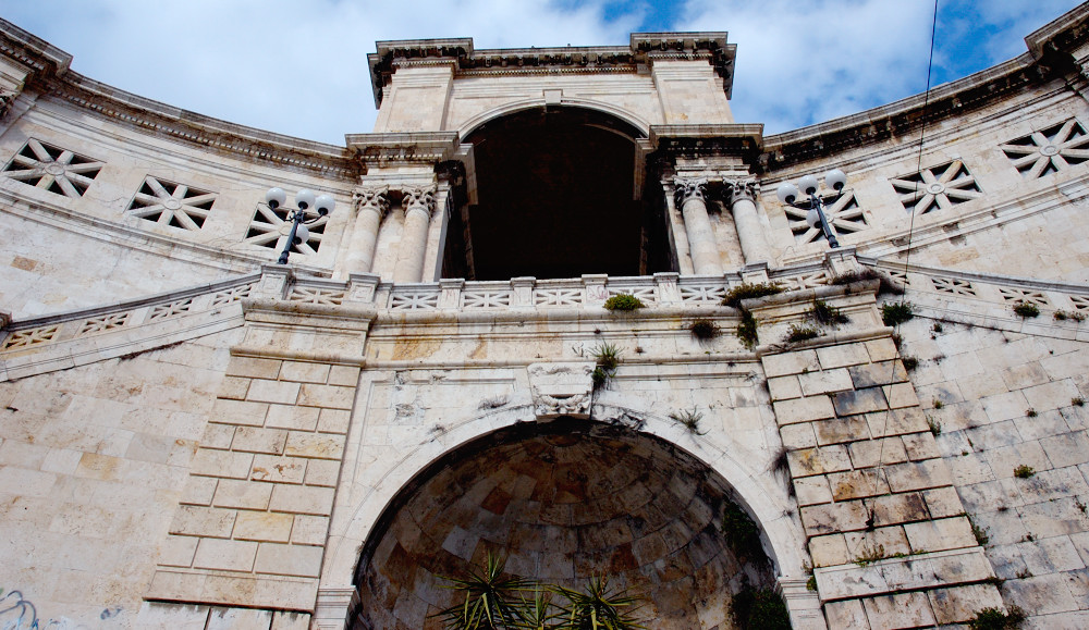 Cagliari, Sardegna, Italia